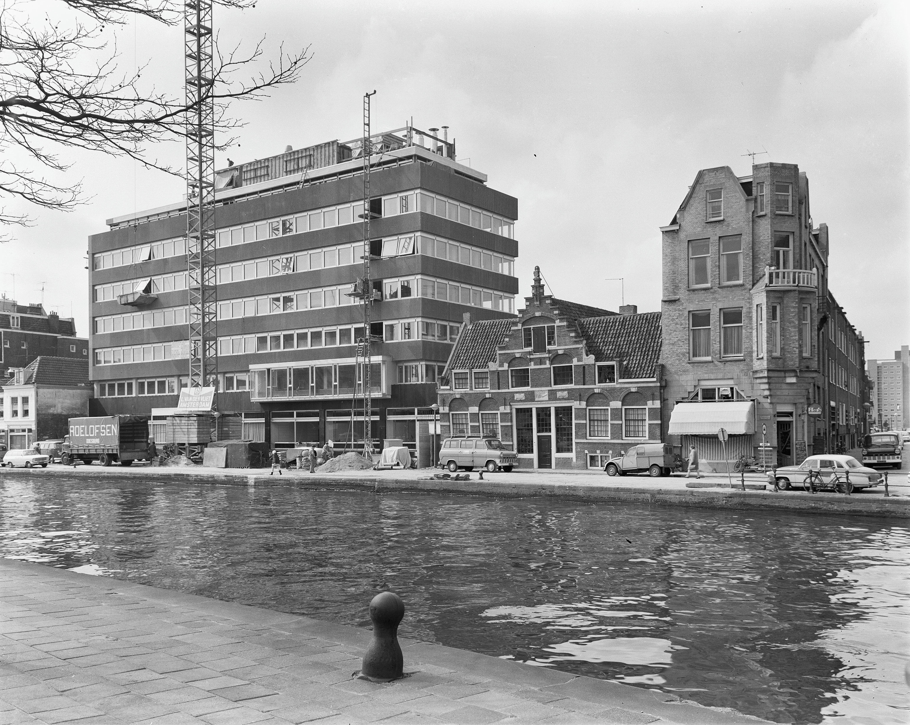 nieuwbouw bij Veerhuis, aanzicht